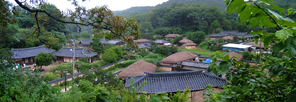 Yangdong Folk Village in Gyeongju, Gyeongsangbuk-do, South Korea